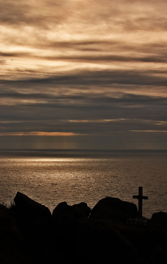 Cabo Prior, Valdoviño, A Coruña, Galiza'Cabo Prior Cross'